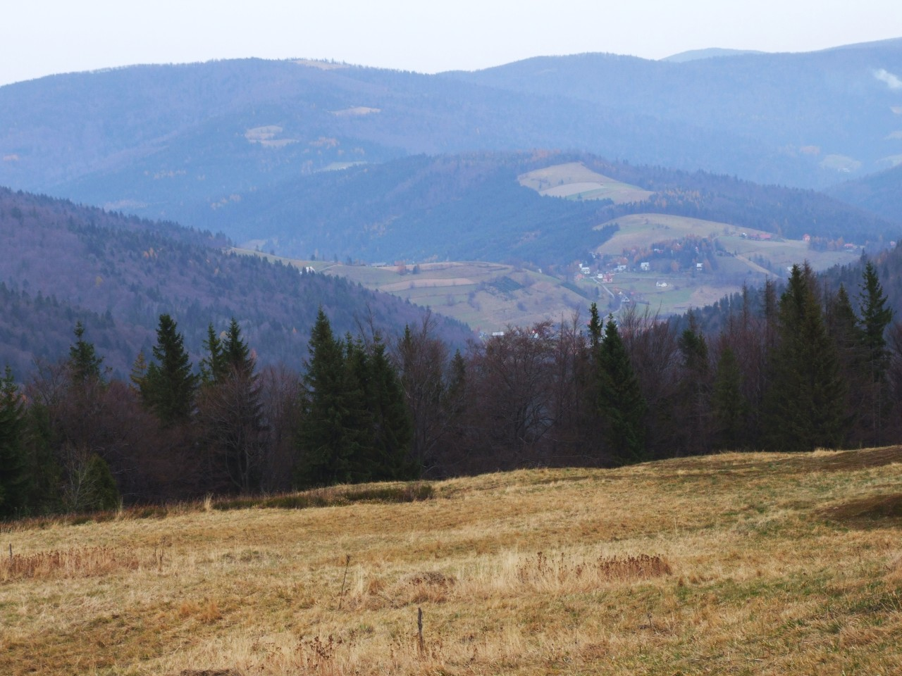 Polana Bieniowe w Gorcach i widok na Beskid Wyspowy